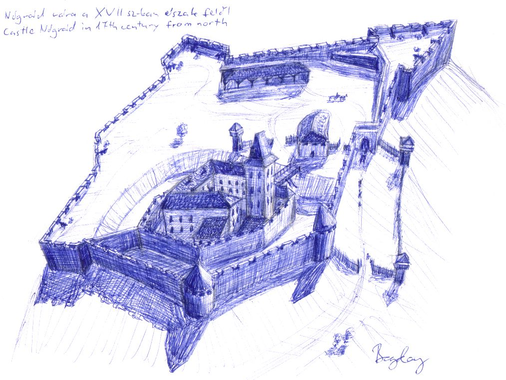 A nógrádi vár rekonstrukciós rajza észak felől nézve (17. századi állapotában)